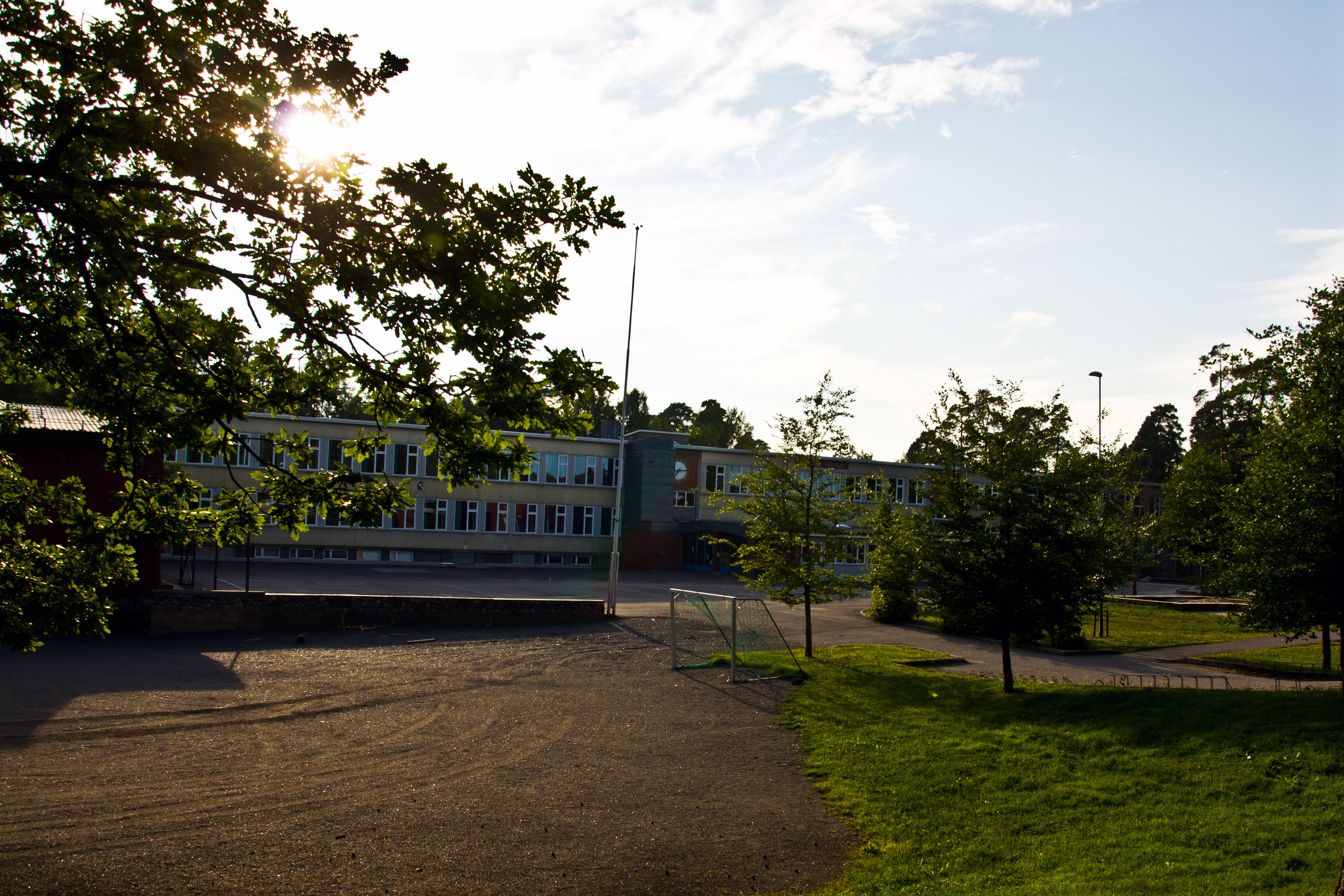 Lillaas Skole, Horten